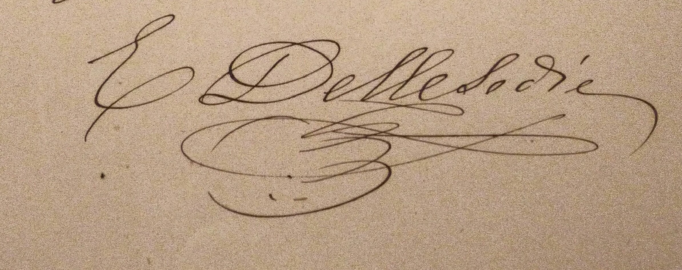 Signature de l'artiste lyrique italien Enrico Delle Sedie au bas d'un courrier (21 février 1865) suite à sa nomination comme professeur de chant au Conservatoire de Paris. Archives nationales (France), F/21/1294.